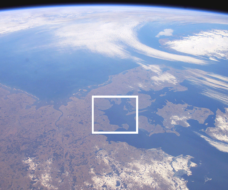 la kila golfo, vidata en satelita bildo